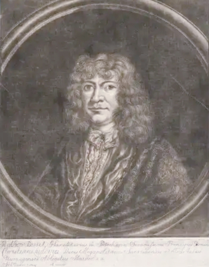 Porträt des Anton (von) Bessel (1646–1701; Sohn des Heinrich Bessel, Kanzler des Fürstentums Minden), Erbsasse zu Petershagen in Westfalen; herzoglich mecklenburg-schwerinscher Hofrat und Gesandter zur Friedenskonferenz von Nimwegen, dann herzoglich anhaltischer Kanzler zu Quedlinburg.